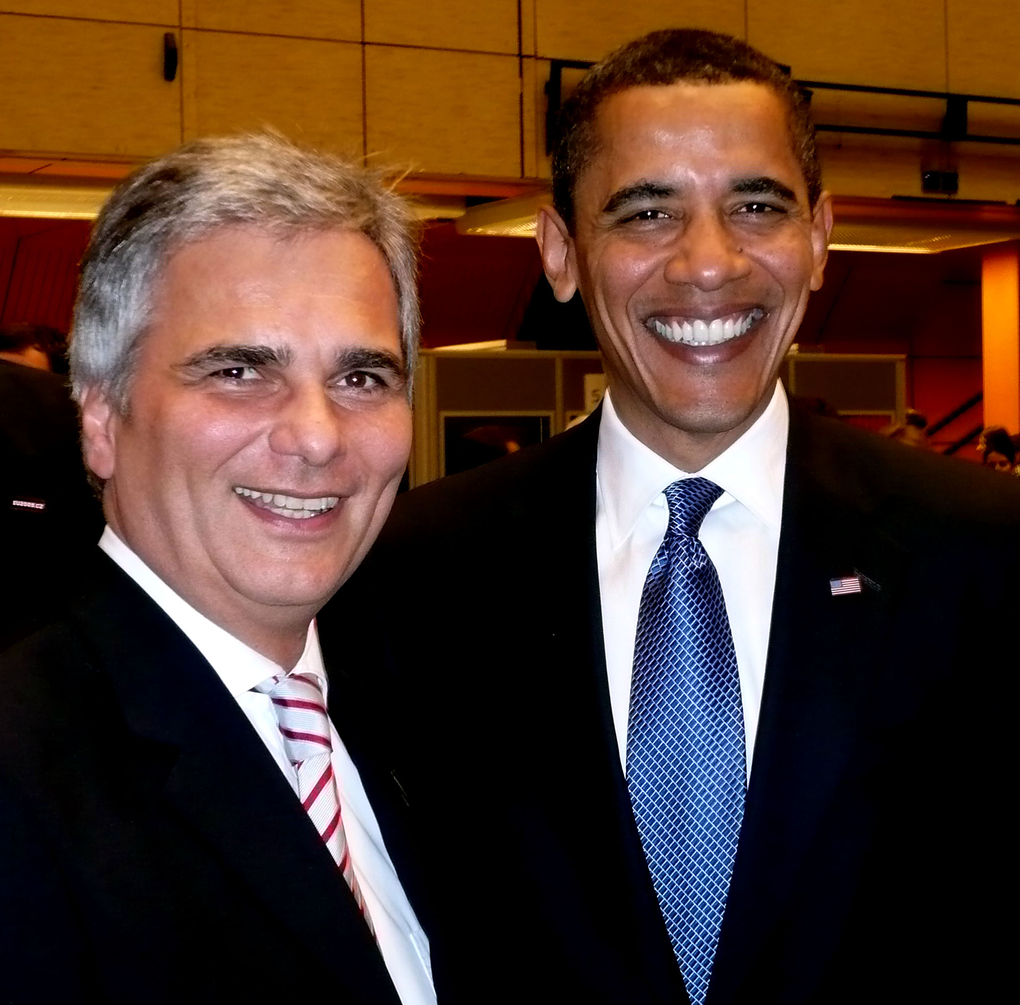 Sonntag, den 5. April 2009 fand in Prag, Tschechien das EU-USA-Gipfeltreffen statt. Im Bild Österreichs Bundeskanzler Werner Faymann und US-Präsident Barack Obama. Foto: BKA/HOPI-Media